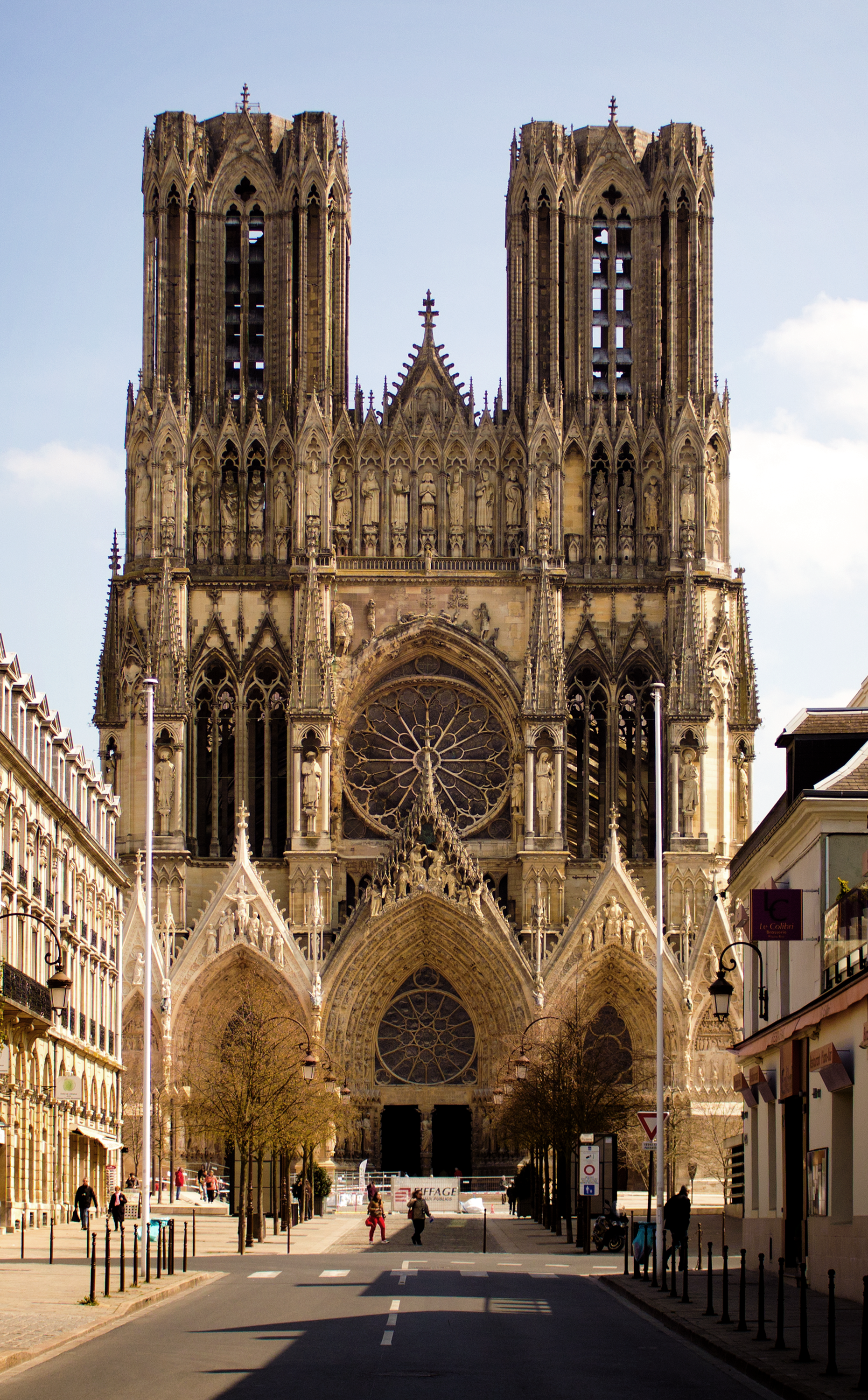 Facade de Cathédrale Notre-Dame de Reims